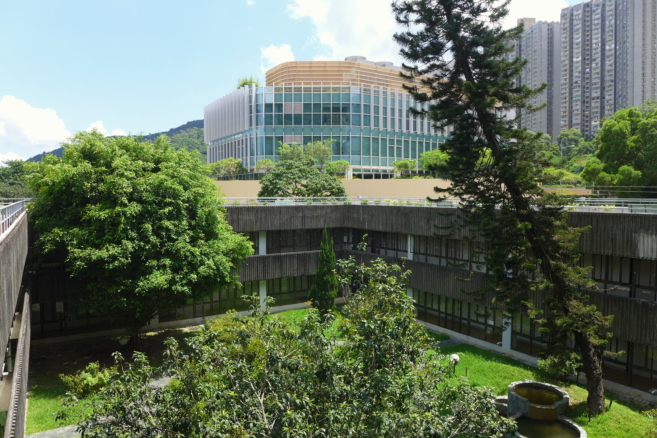 Hang Seng Management College Hostel Courtyard